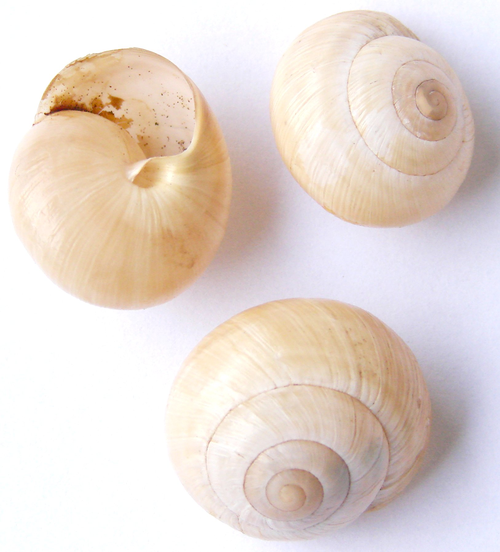 Bradybaena fruticum